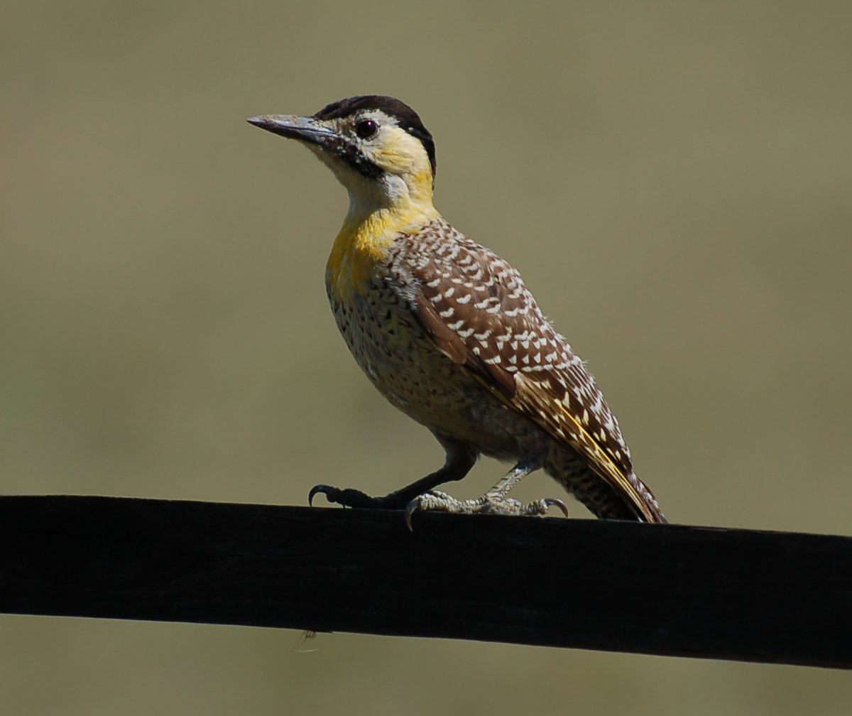 CARPINTERO DE CAMPO Colpates campestris ??